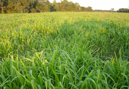 ES una imagen tomado en los campos de brachiaria en Toledo Antioquia.